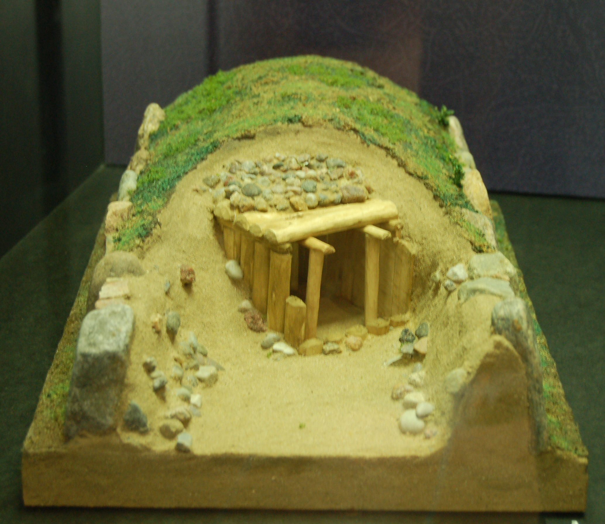 Schematisches Modell des Steingrabes III der Oldendorfer Totenstatt.